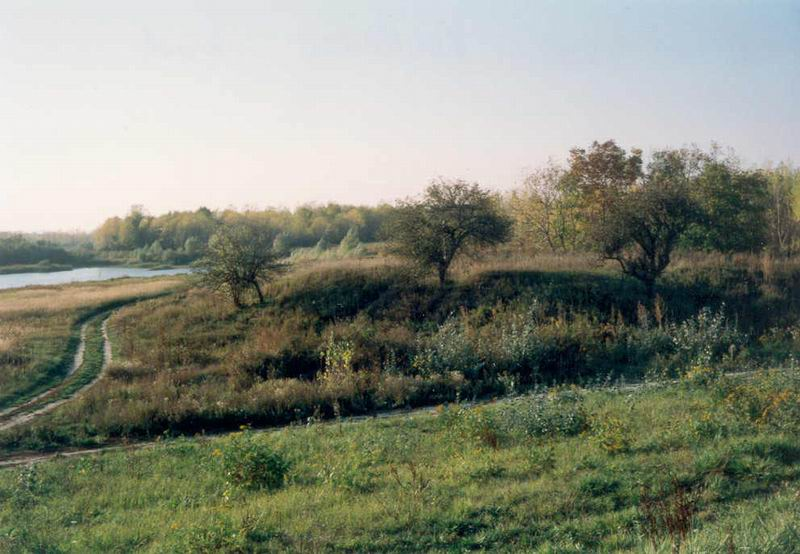 Kolarovo